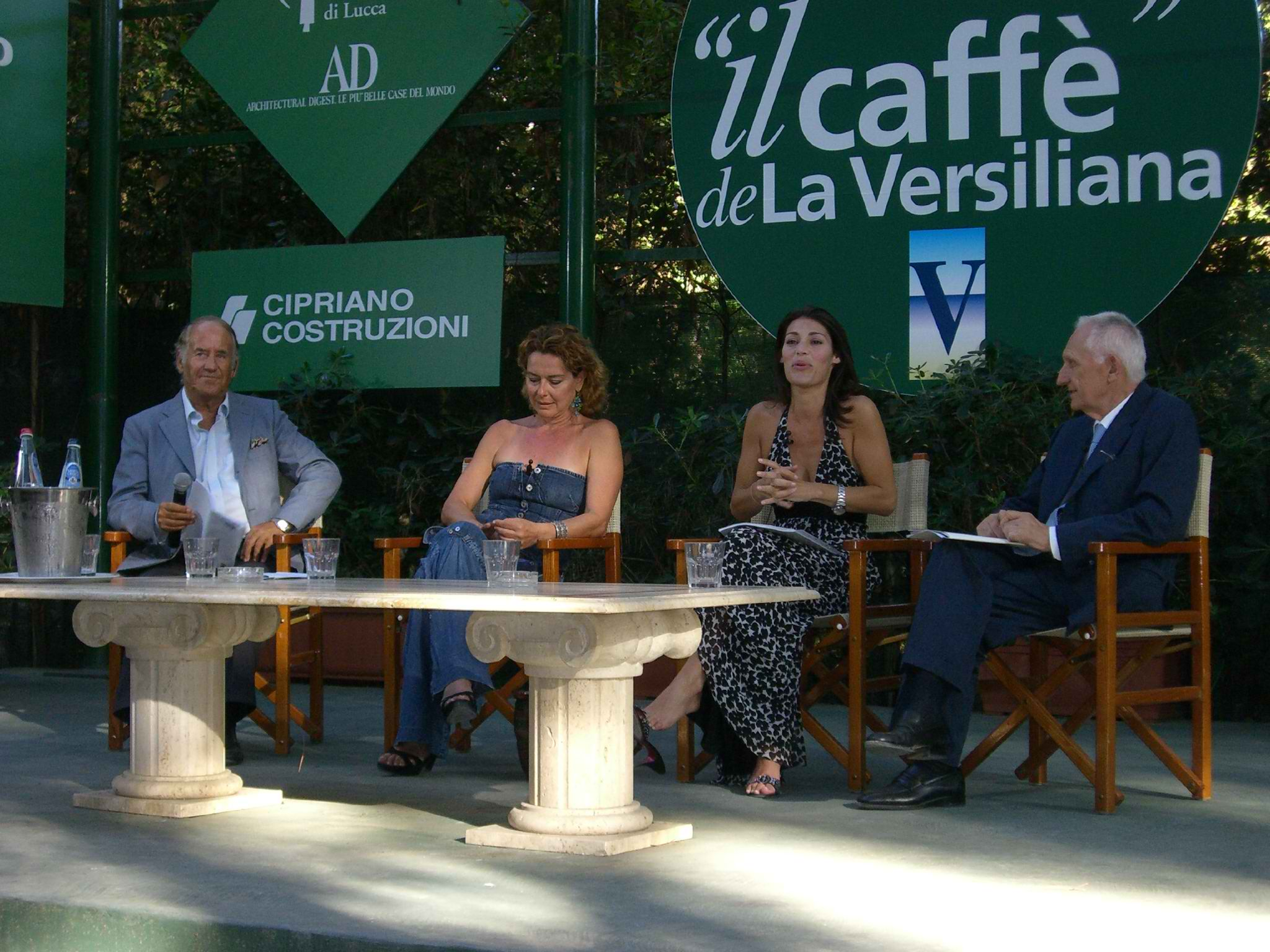 Omaggio a Paolo Stoppa - Caffè de La Versiliana, Marina di Pietrasanta - Italia